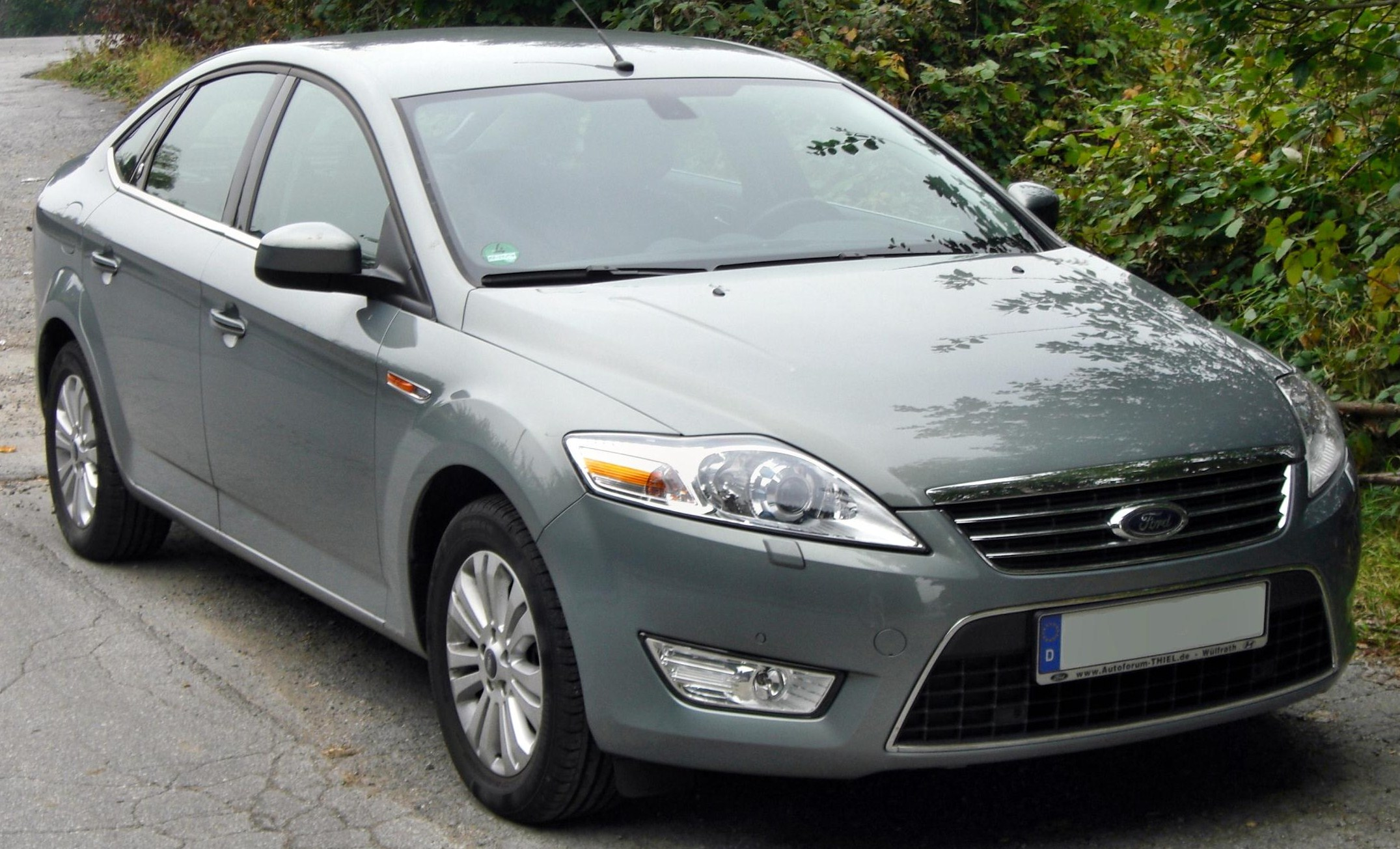 Ford Mondeo MK4 Fließheck